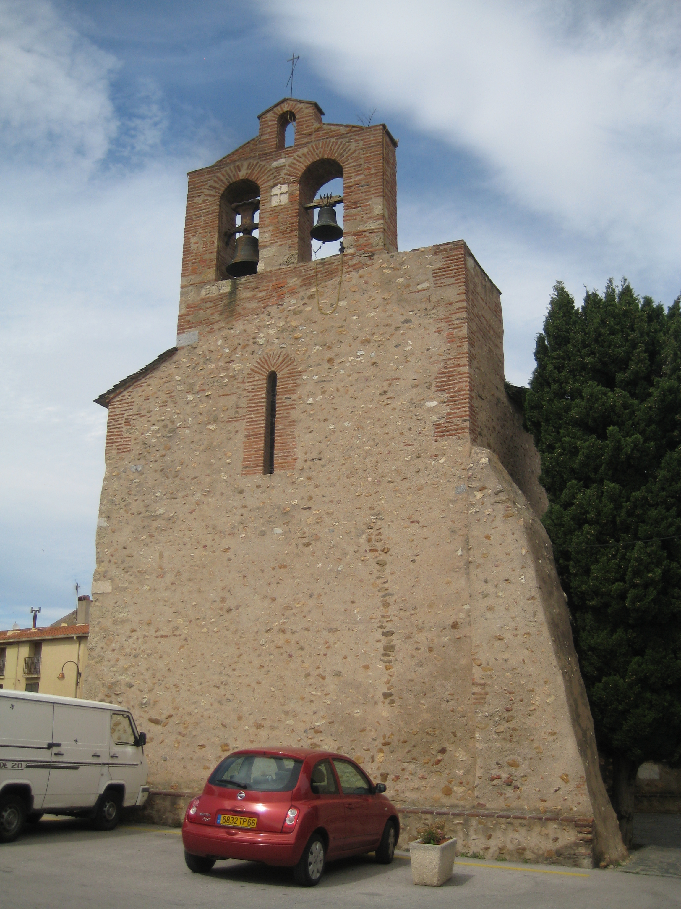 église de Pollestres, XIIe siècle .